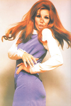 Susana Giménez exclamando su famoso '¡Shock!' de la publicidad de jabones Cadum